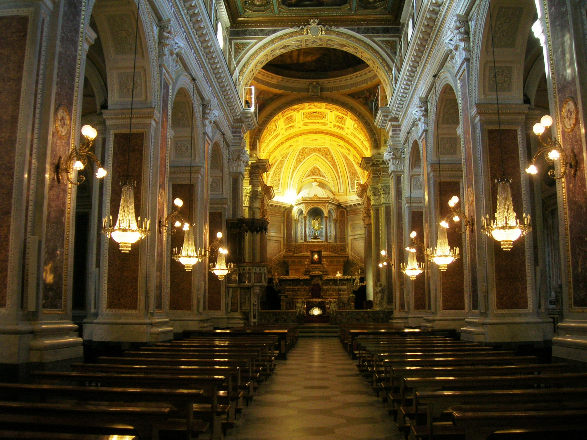 La basilica di San Michele Arcangelo a Piano di Sorrento